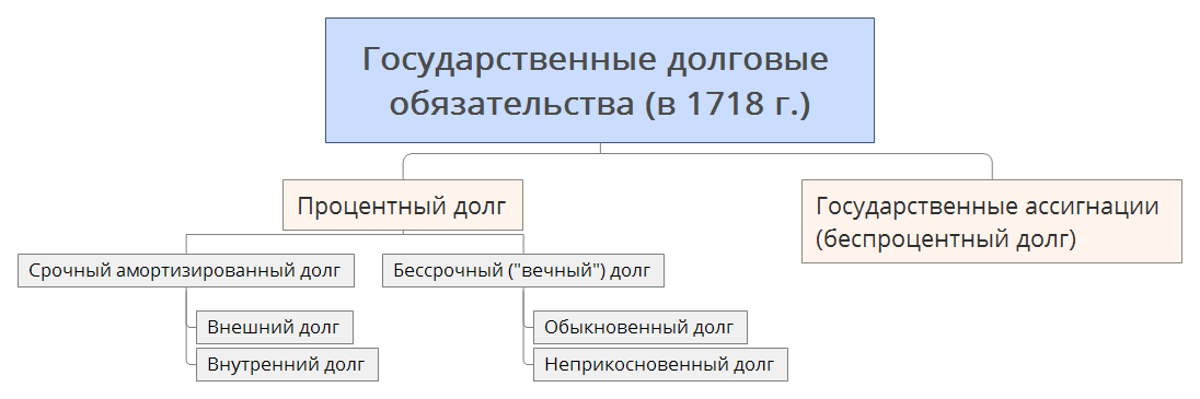 Классификация государственных долговых обязательств по уставу Государственной комиссии погашения долгов от 1817 года.